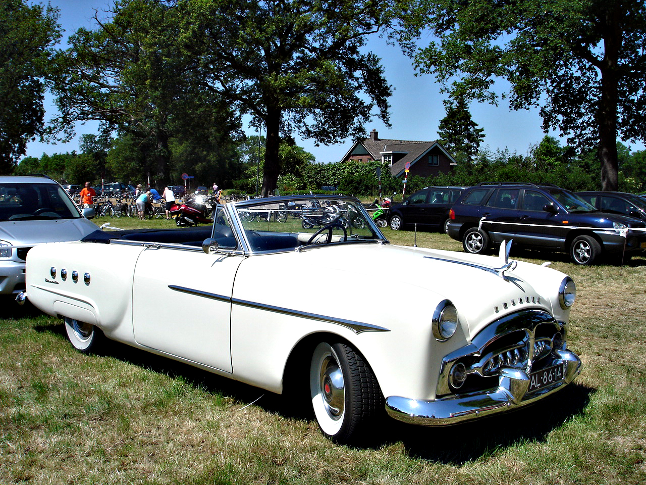 Packard 250 Convertible, 1951